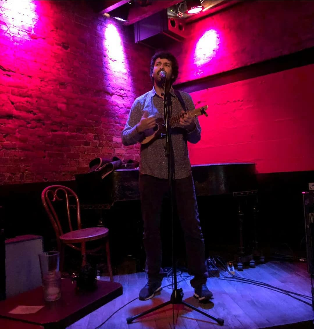 Maldtiro Ramirez en Rockwood Music Hall de New York